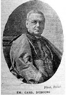 Cardinal Auguste Dubourg (1842 - 1921)- Évêque de Moulins (1893-1906) - Archevêque de Rennes (1906-1921)